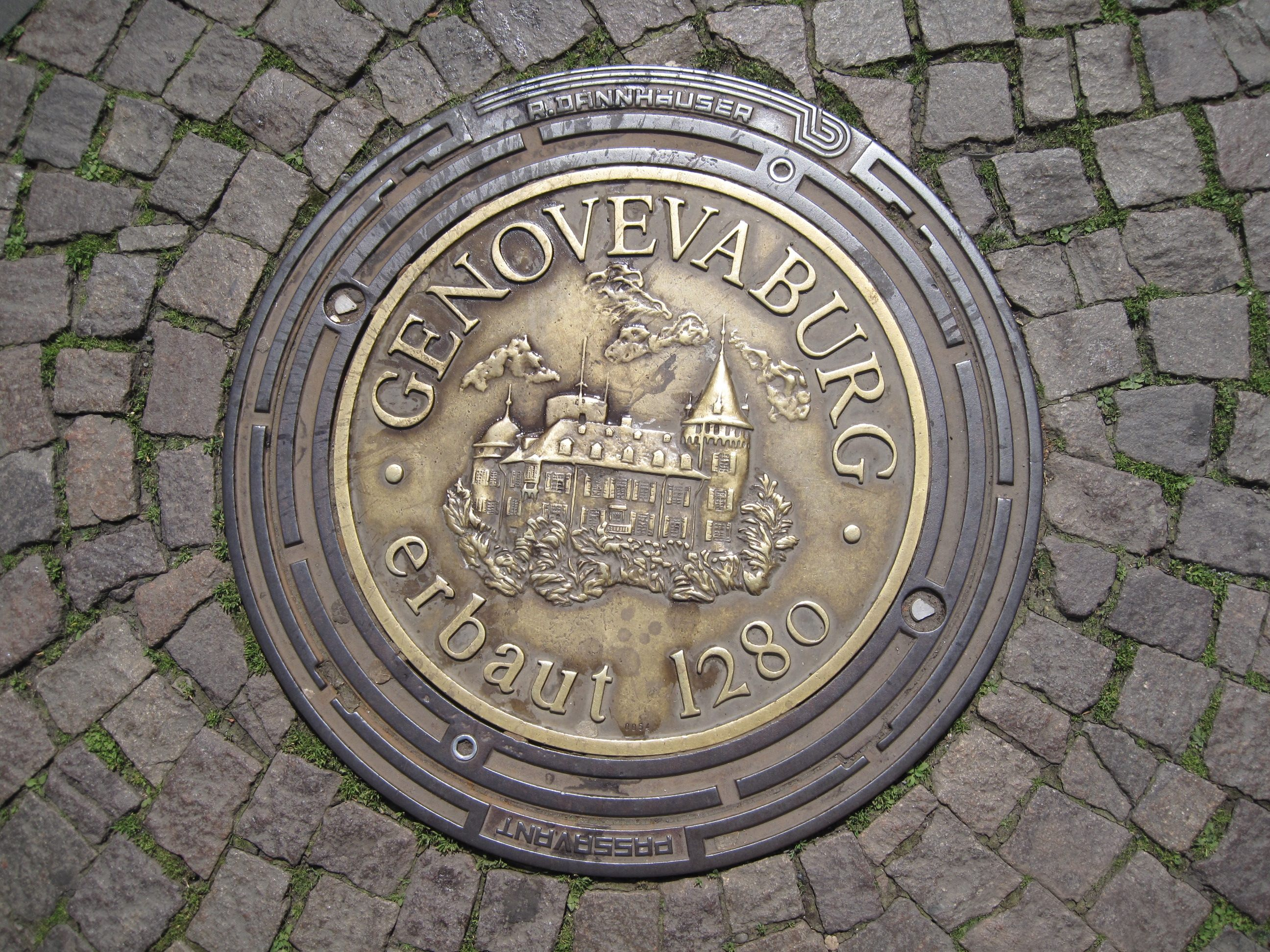 Schachtdeckel in Mayen (Genovevaburg erbaut 1280).